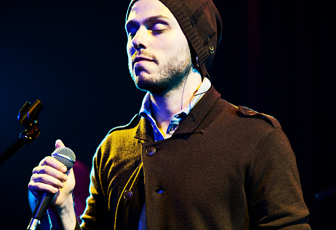 SunSay